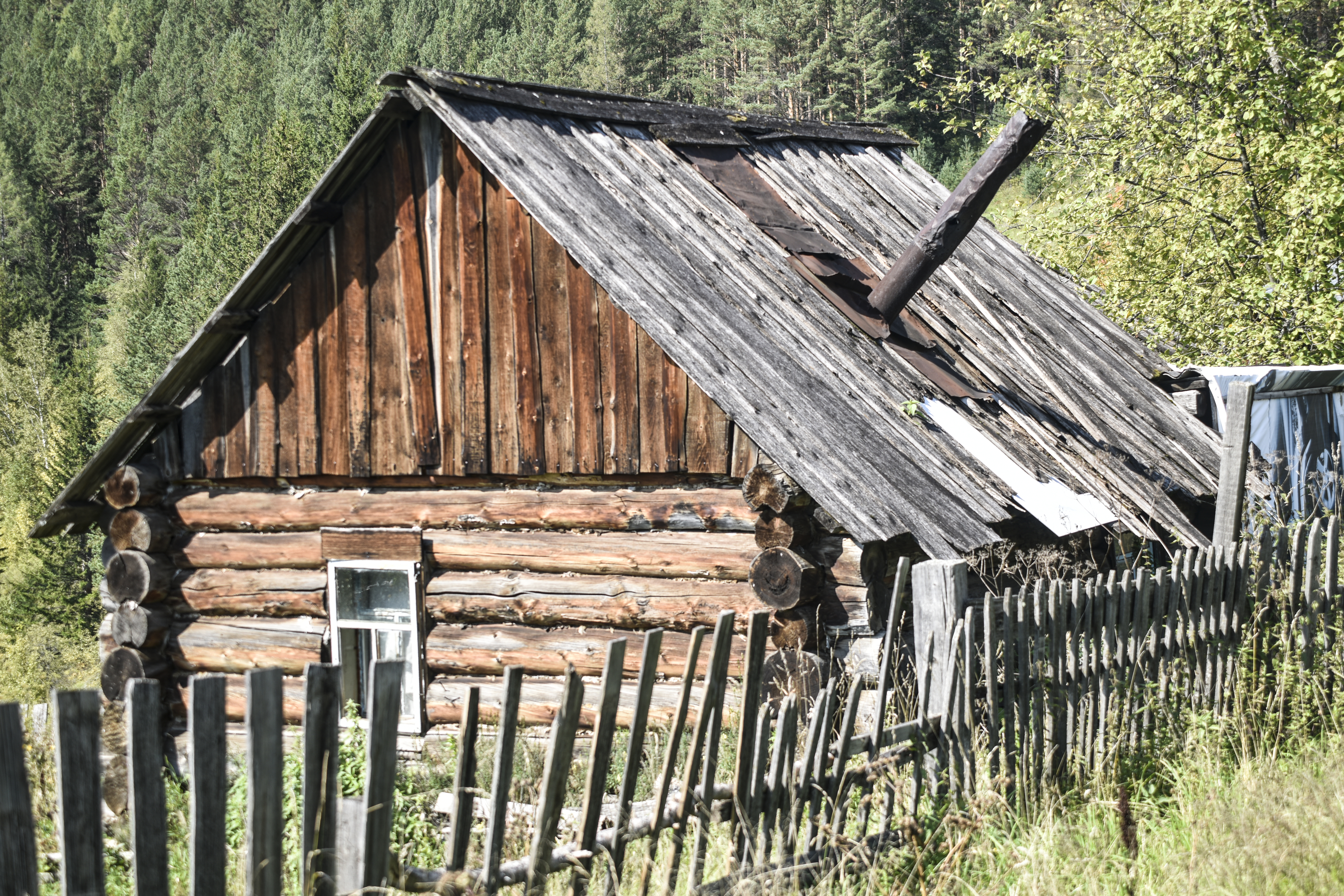 Банька по-белому. Красноярский край, деревня (район) Верхняя Базаиха, 2017 год